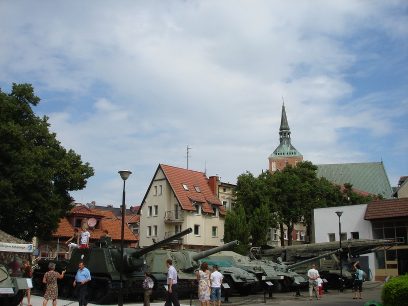 Kołobrzeg, Muzeum Oręża Wojska Polskiego